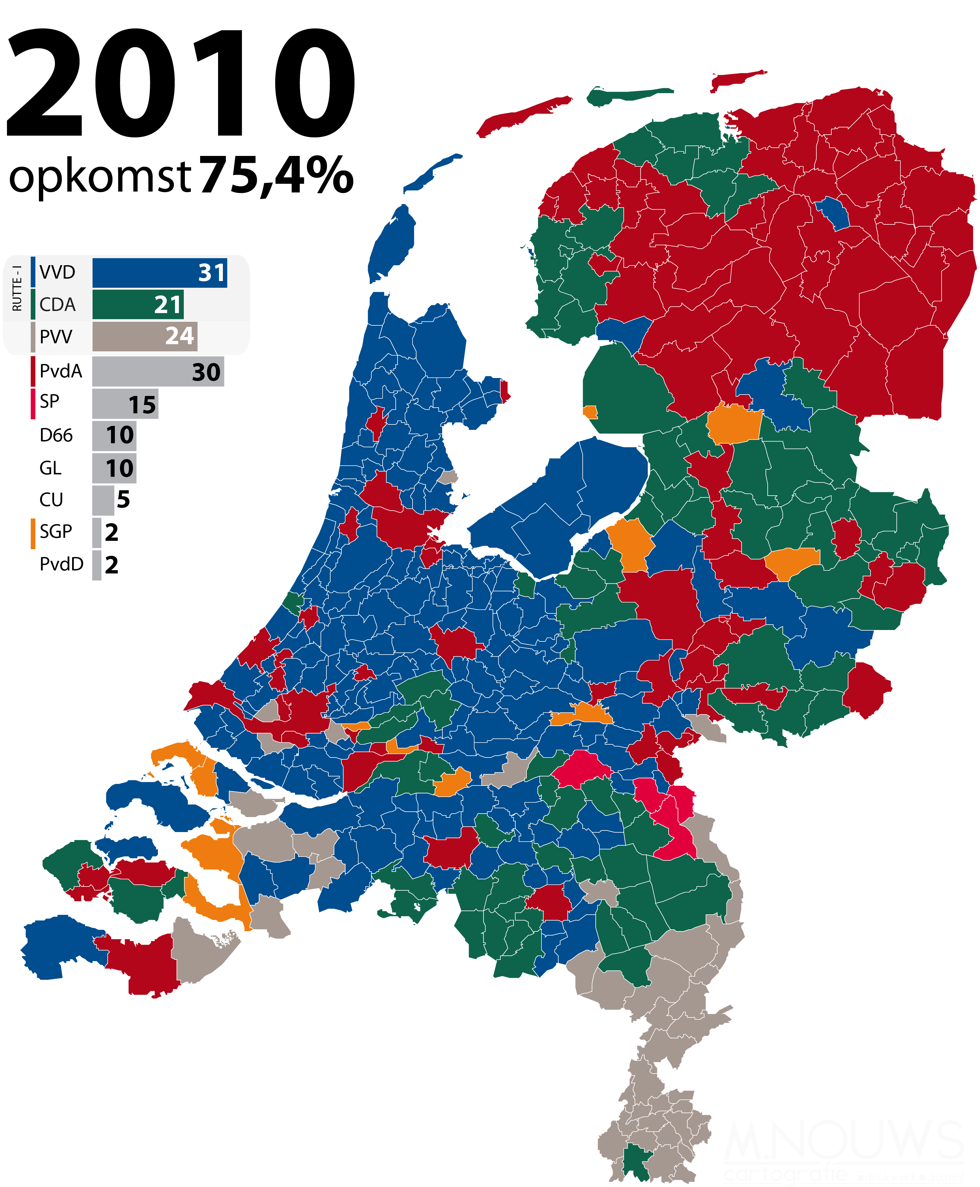 Grootste politieke partij per gemeente, zetelverdeling en kabinetscoalitie bij Tweede Kamerverkiezingen 2010